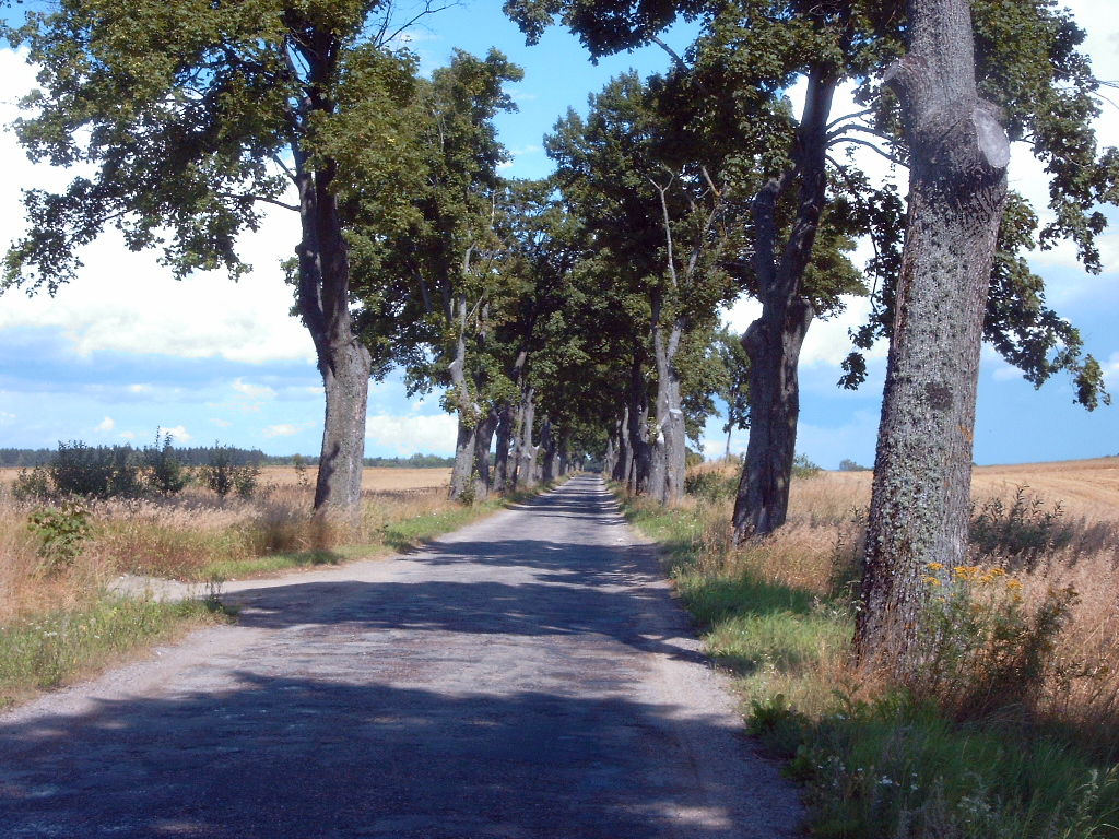 Alleebäume in Masuren